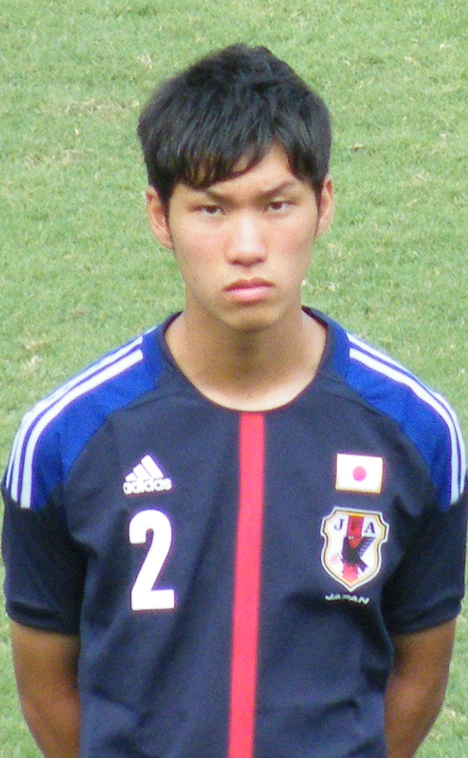 内山裕貴選手。 2013 SBSカップ国際ユースサッカー1日目、U-18日本代表対U-18ウルグアイ代表（藤枝総合運動公園サッカー場）にて。